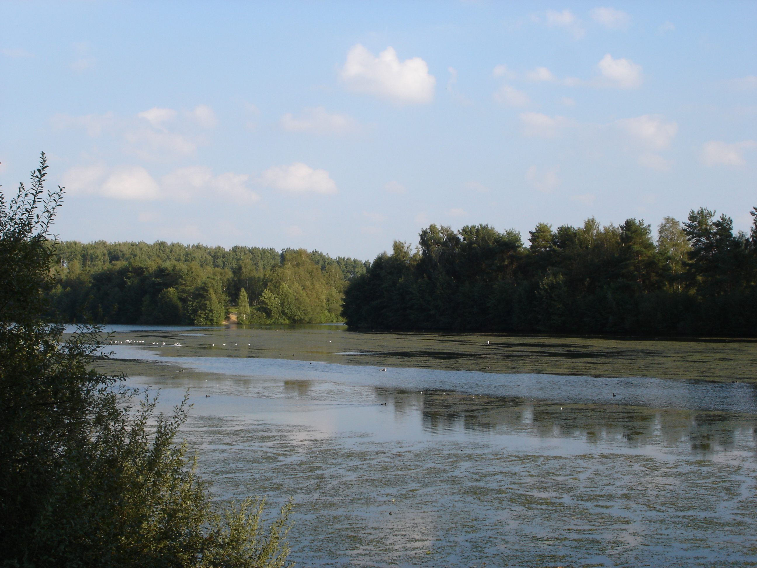 Hiltruper See in Münster-Hiltrup, Westphalia, Germany